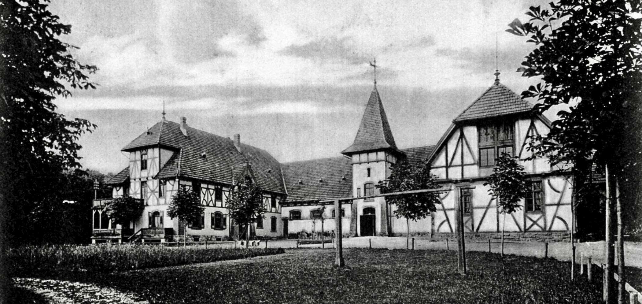 Bei dem heute als Hofgut Lilienhof bezeichneten Anwesen handelt es sich um das zwischen 1890 und 1892 errichtete Gestüt des August Wilhelm Julius Graf von Bismarck (1849–1920). Es war Teil einer etwa 250 ha großen Hofanlage. Es war eines der bedeutendsten Trabergestüte des ausgehenden 19. Jahrhunderts.